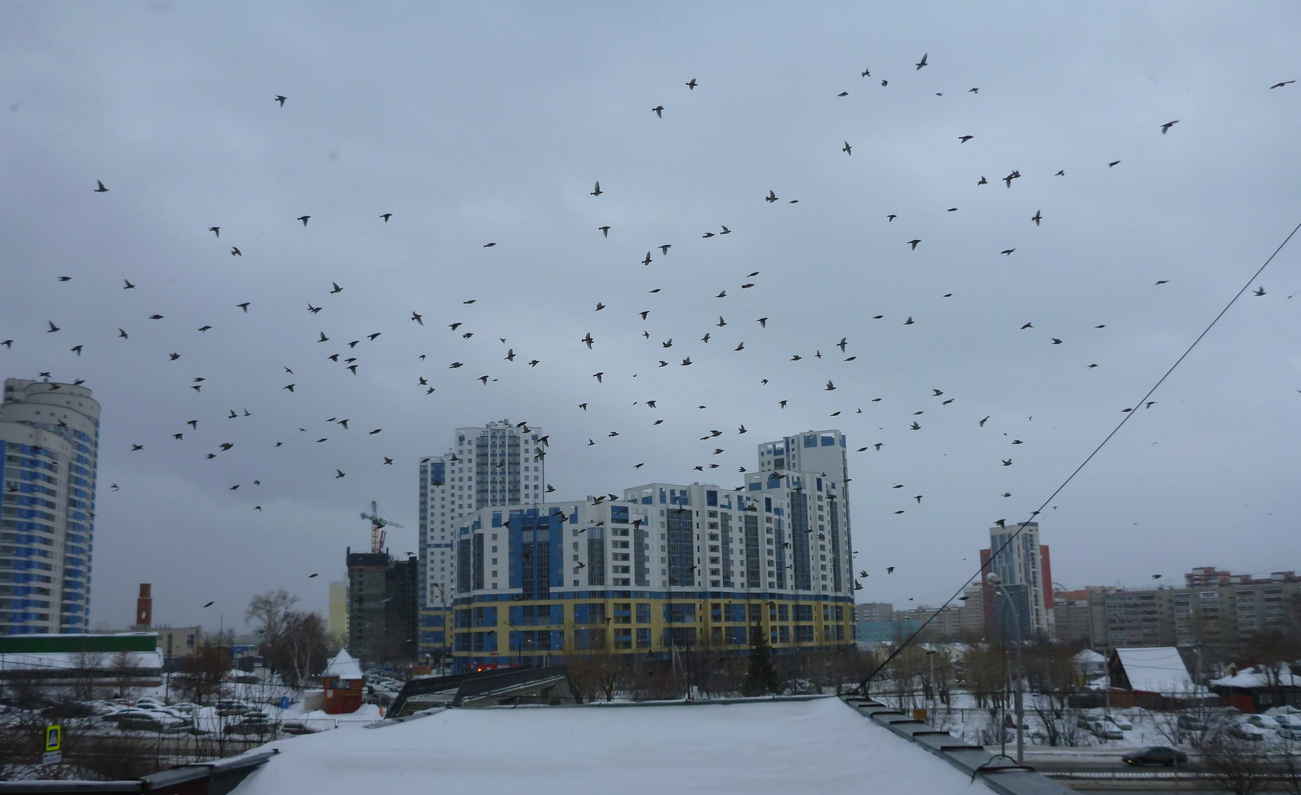 Пролет стаи свиристелей в Екатеринбурге 27 февраля 2020 года